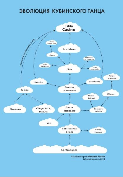 Мною сделана схема эволюции салонных кубинских танцев от Контрданса до Касино